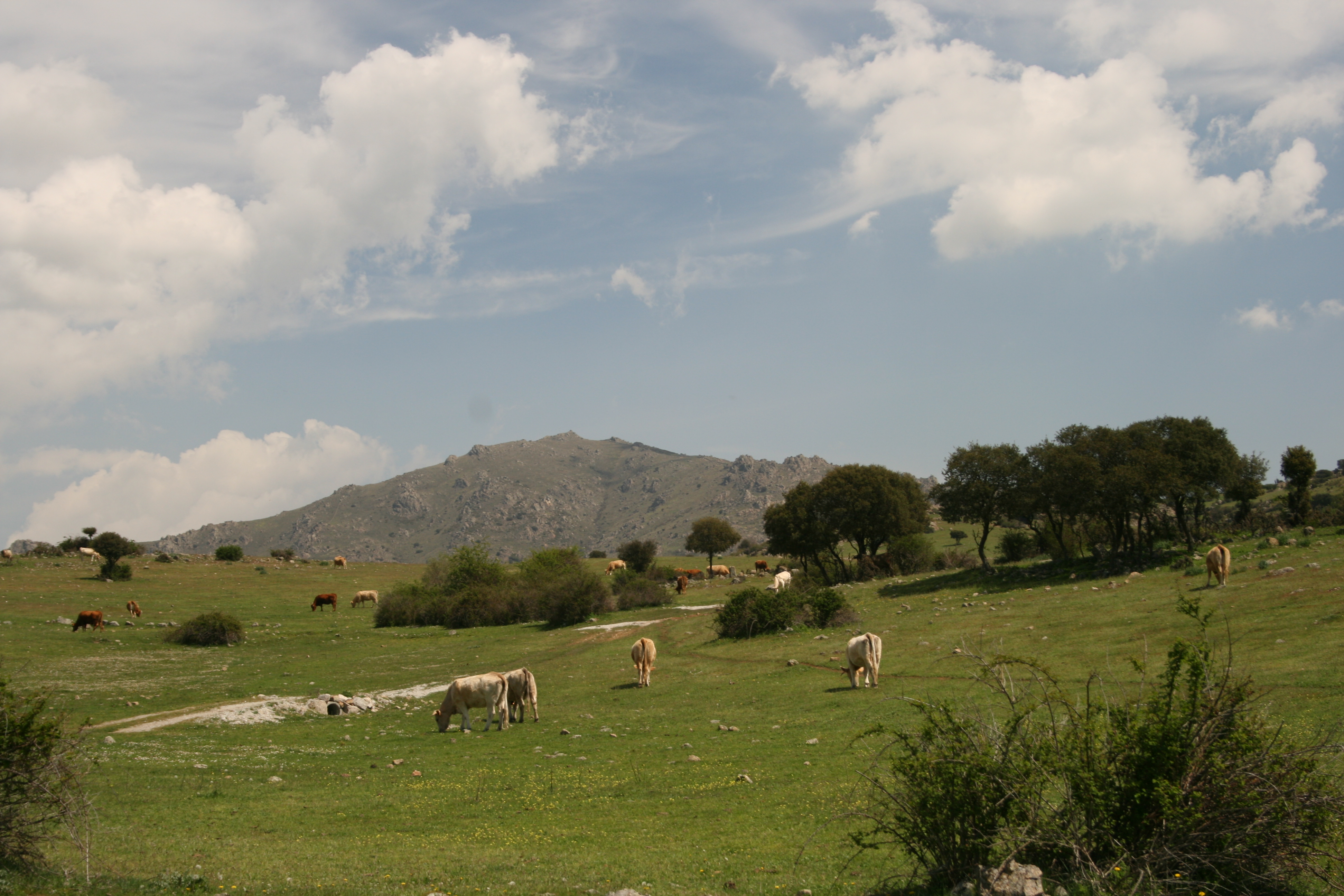 Cerro_de_San_Pedro_desde_Dehesa_Navalvillar